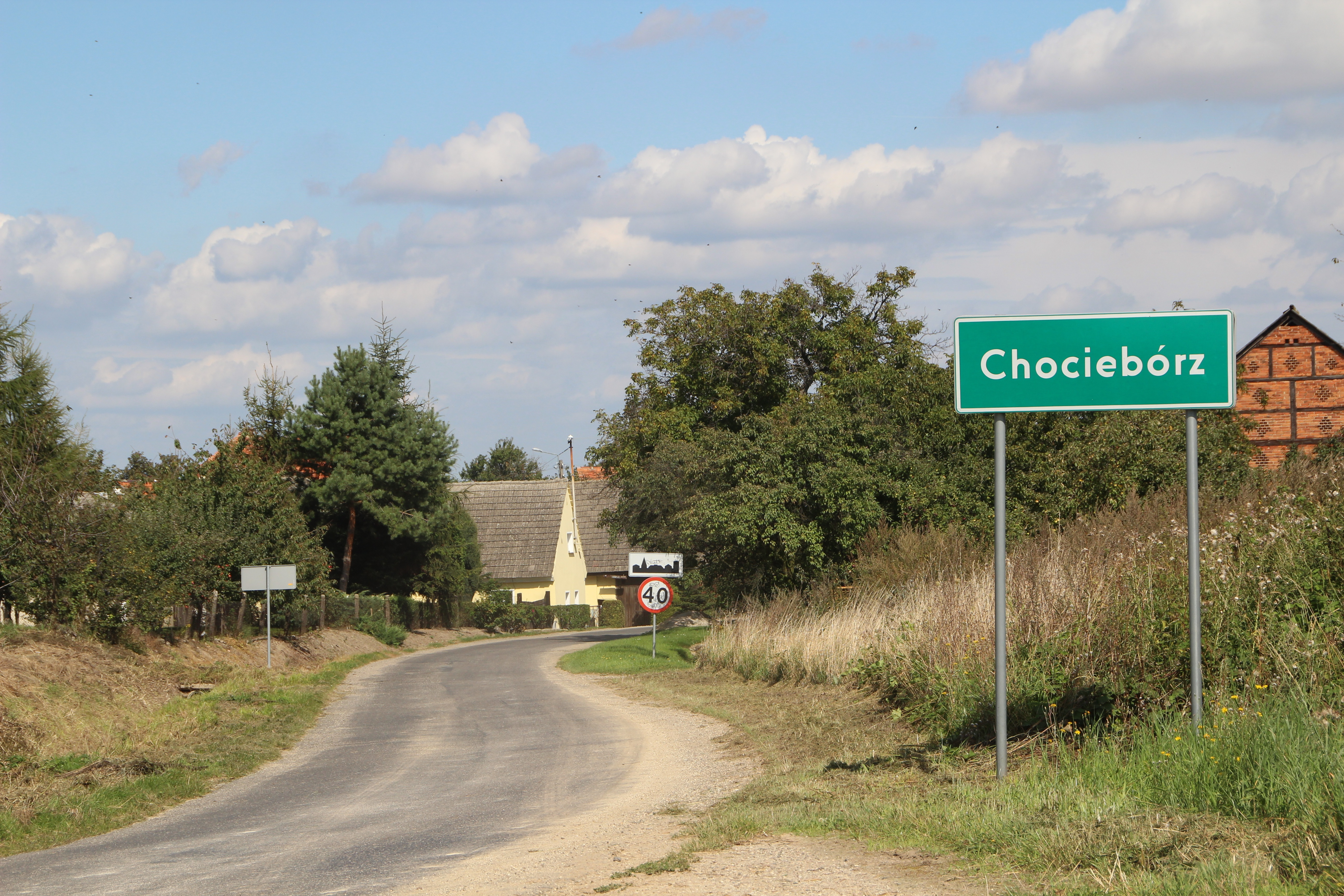 Chociebórz – wieś w Polsce położona w województwie opolskim, w powiecie nyskim, w gminie Kamiennik.